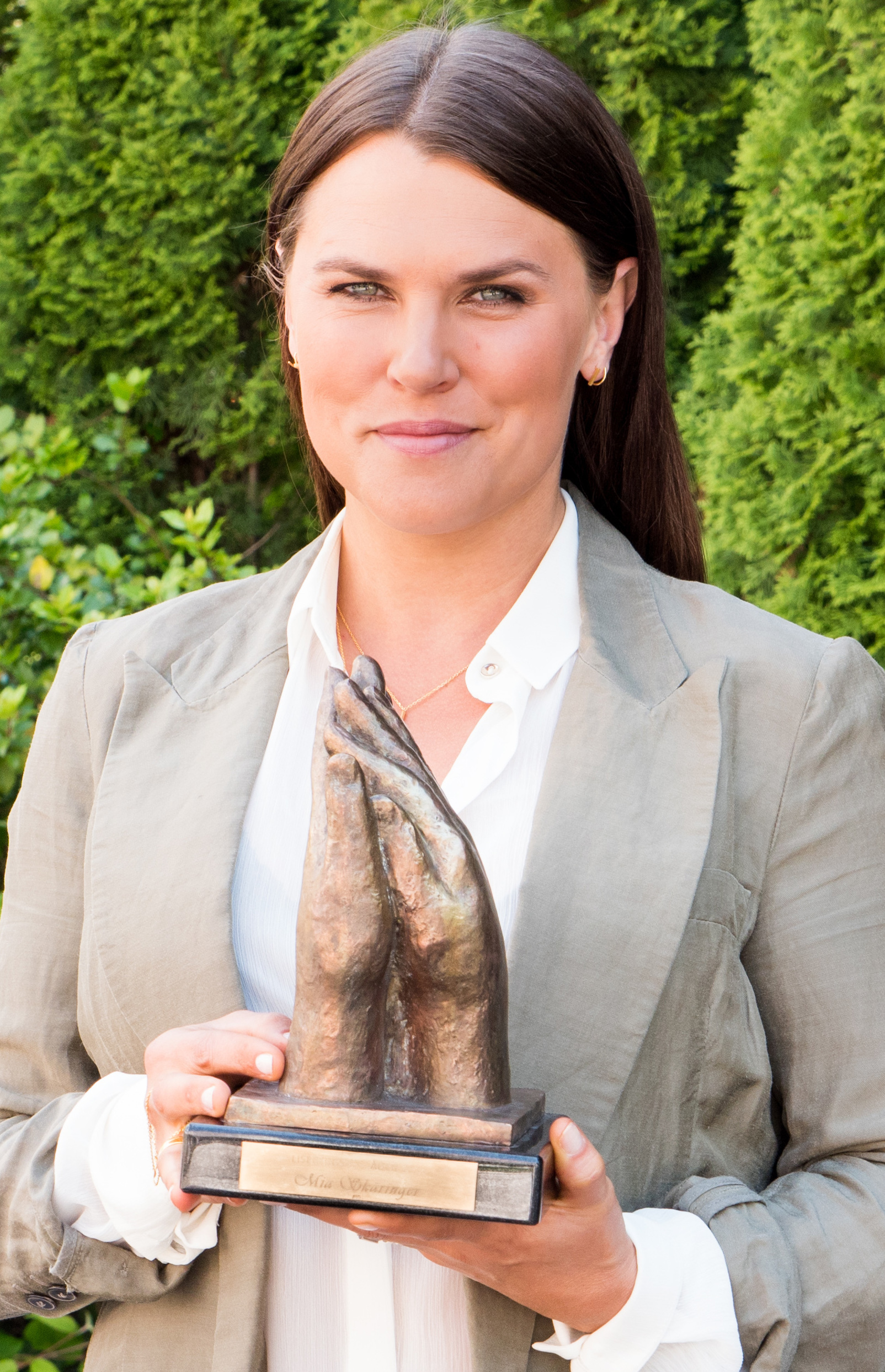 Mia Skäringer tar emot Lisebergsapplåden 22 juni 2015.